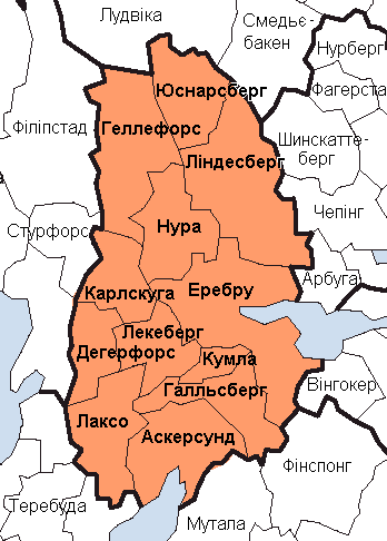 Карта адміністративного поділу лену Еребру у Швеції. Карту створено на основі карти File:Örebro County.png.